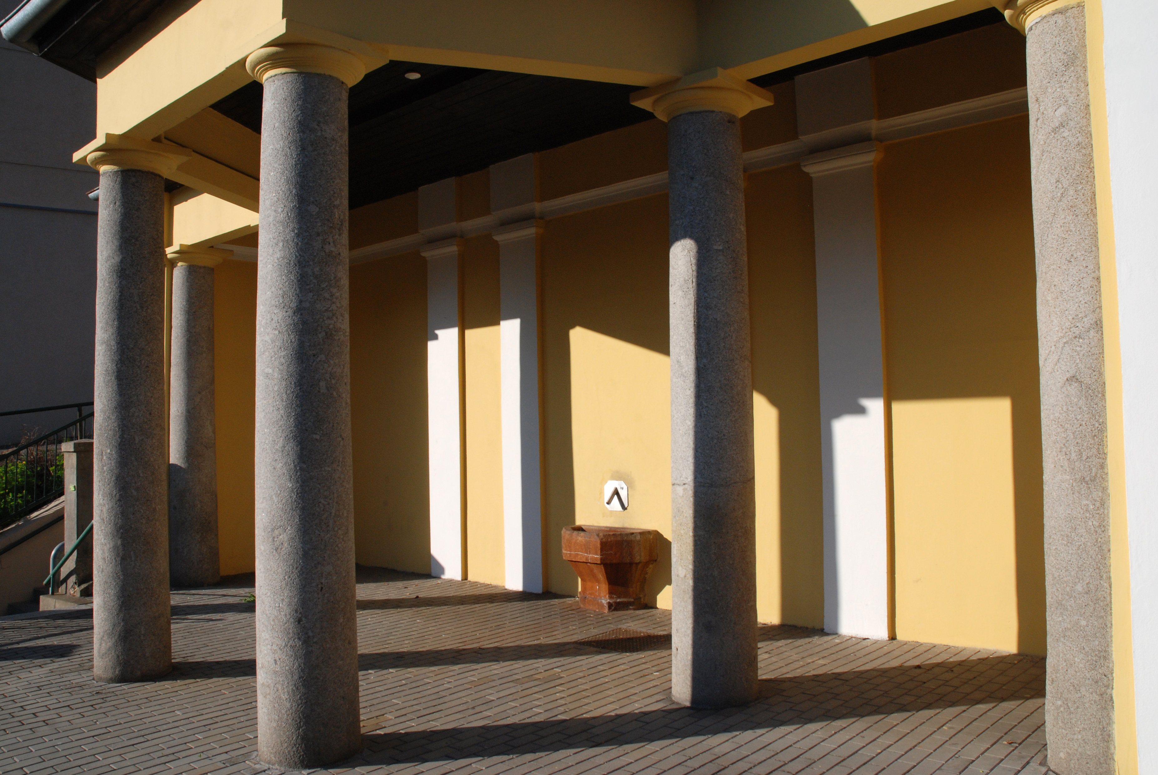 Vývěr Železnatého pramene v pavilonu/kolonádě v Bezručově ulici v Karlových Varech